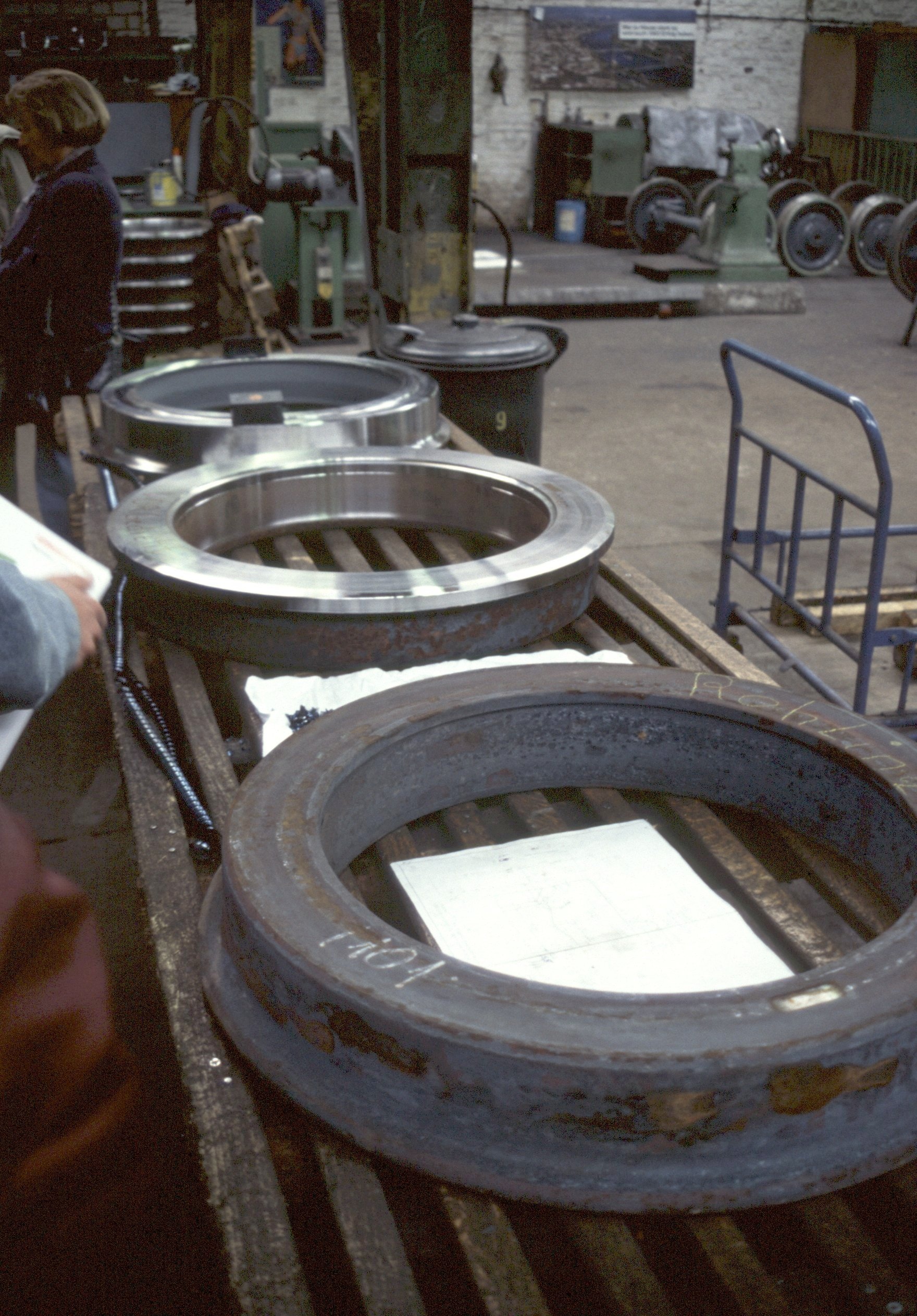 Stählerne Radreifen.